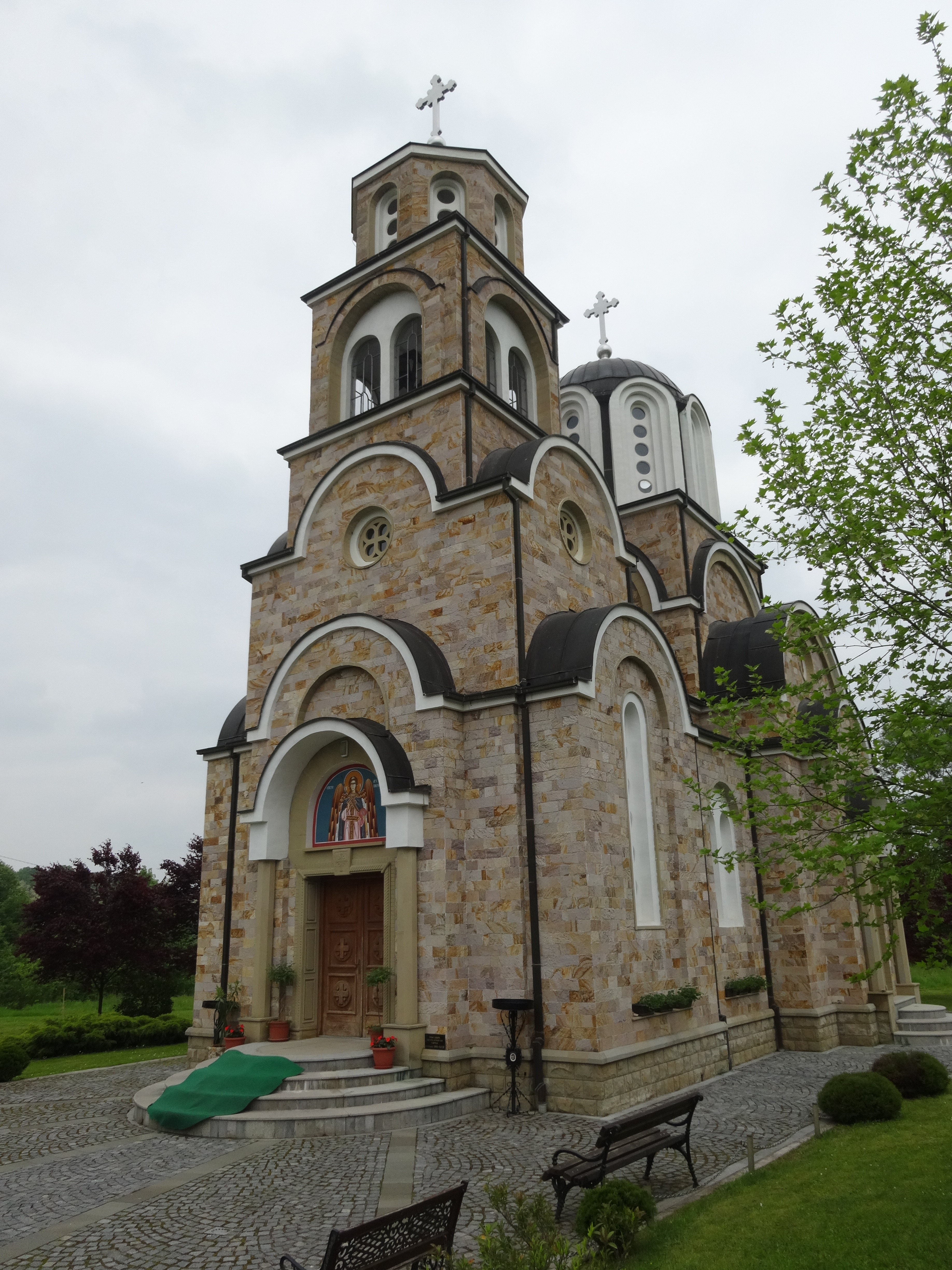 Crkva Sabor Sv. Arhangela Gavrila u Cvetanovcu, Ljig.